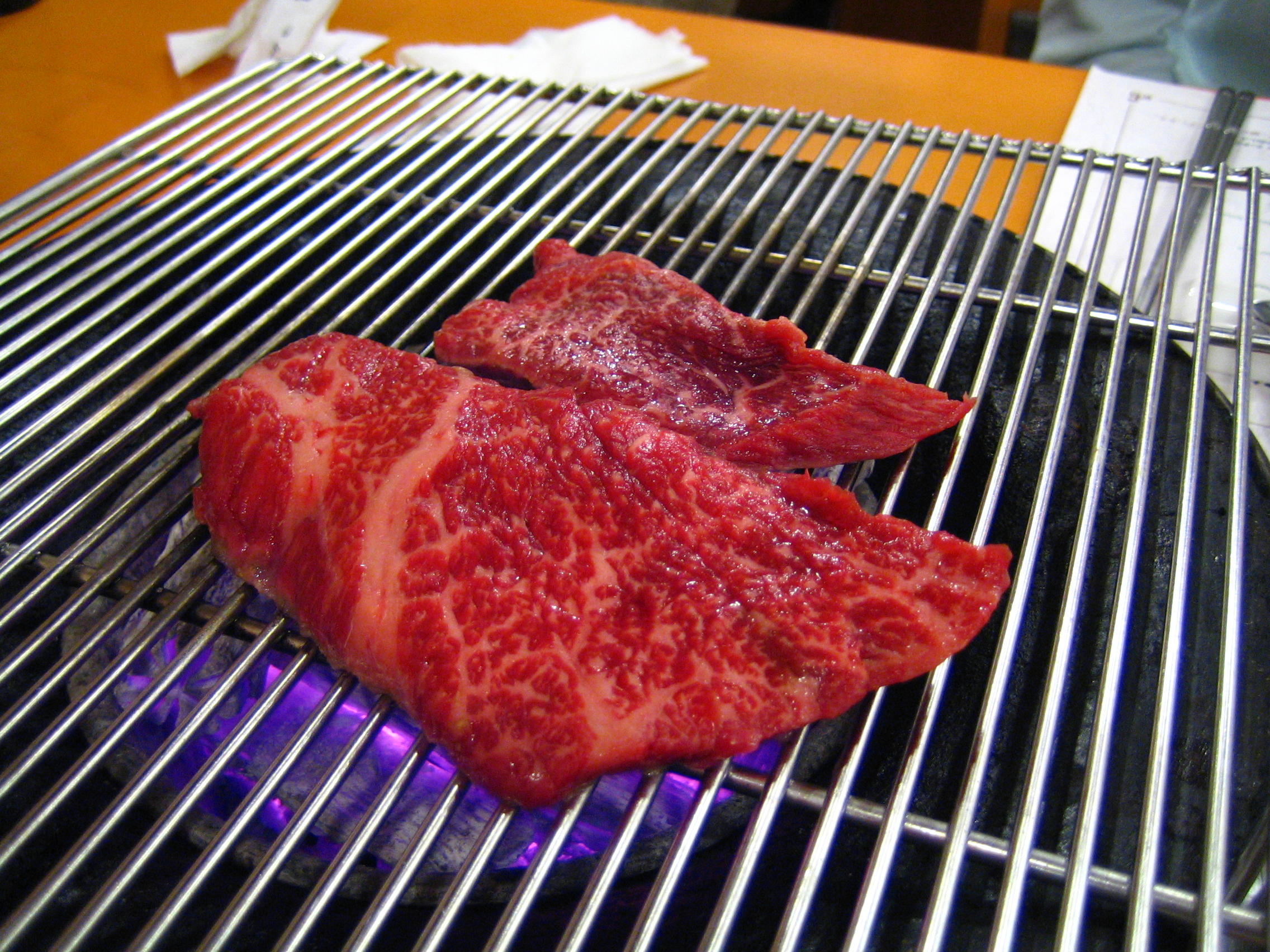 Galbi in Korean cuisine